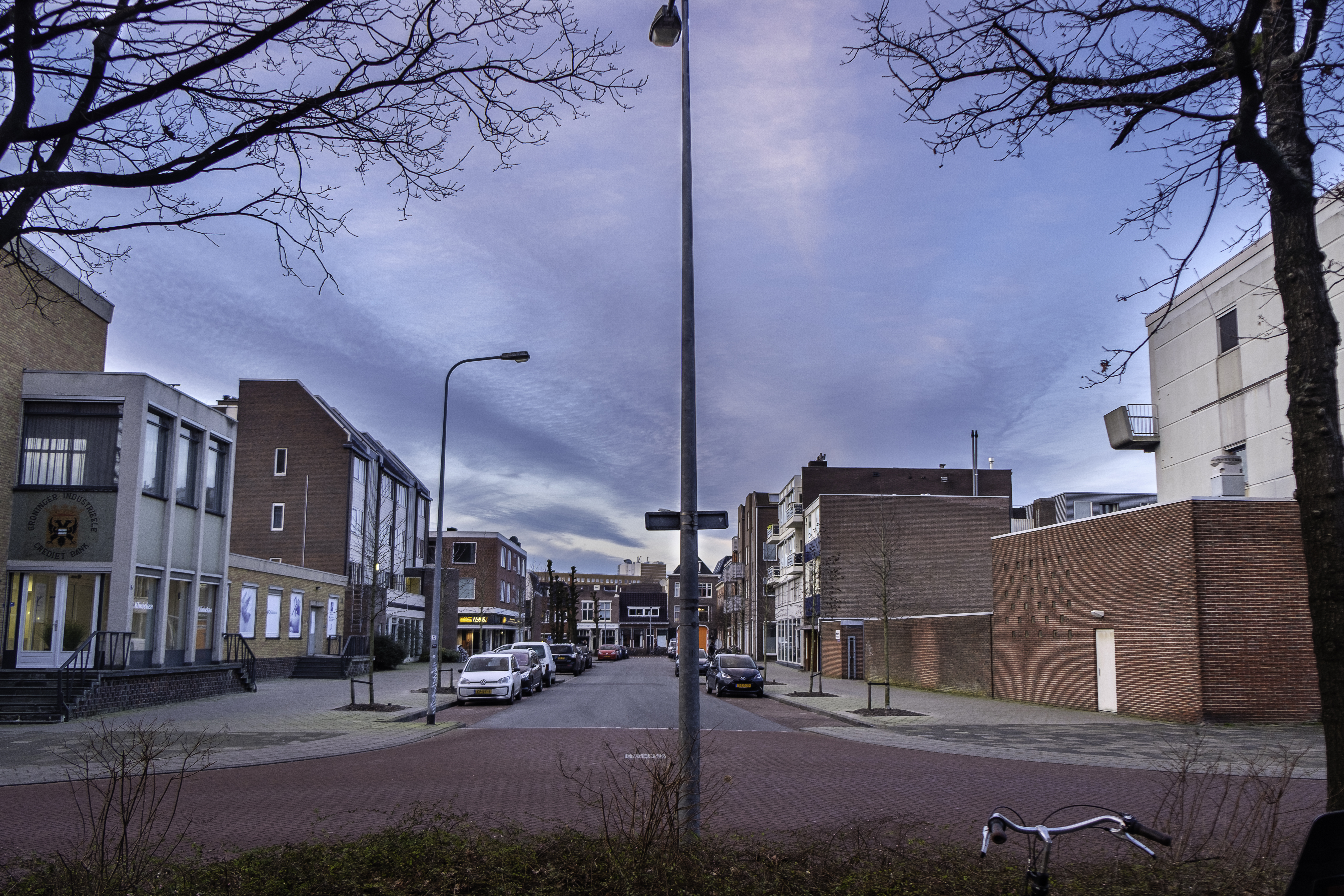 Geulstraat in Groningen